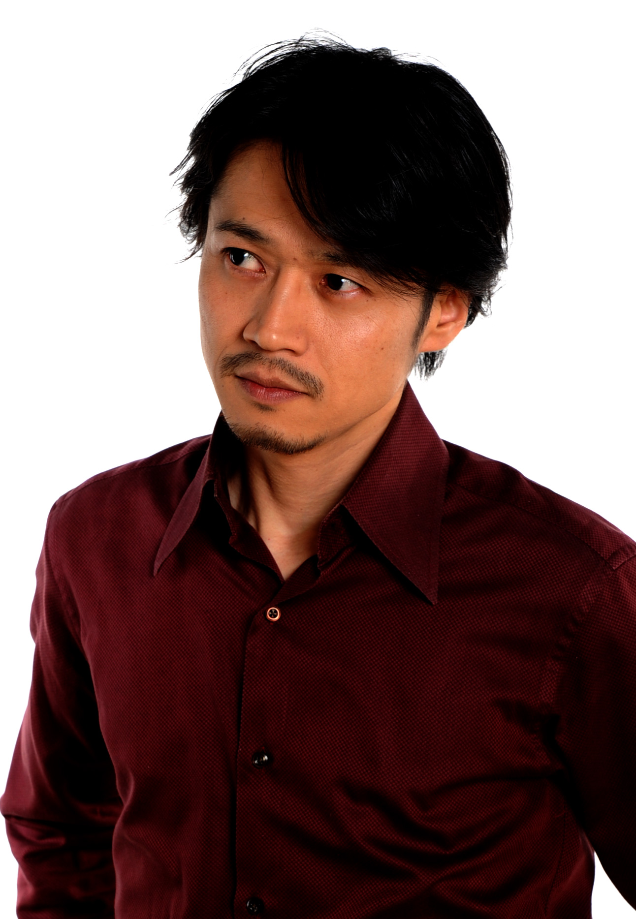 河野匡泰の写真